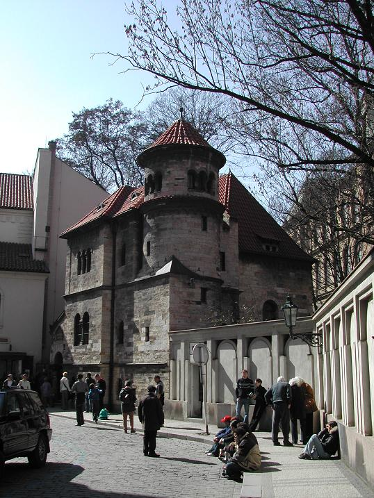 Josefov, Quartiere ebraico nella vecchia Praga foto di Aldo Ardetti (aprile 2005)